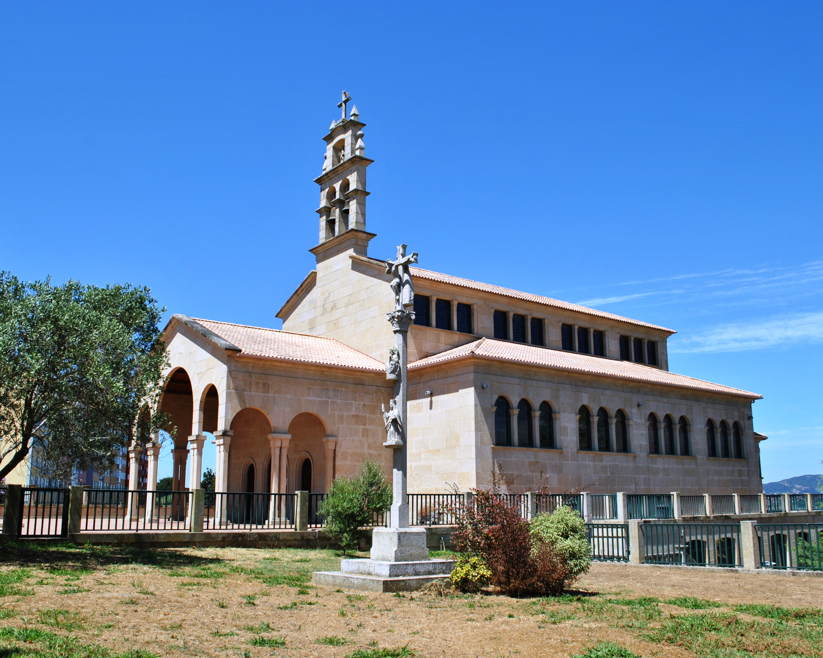 Véxase o título e as categorías